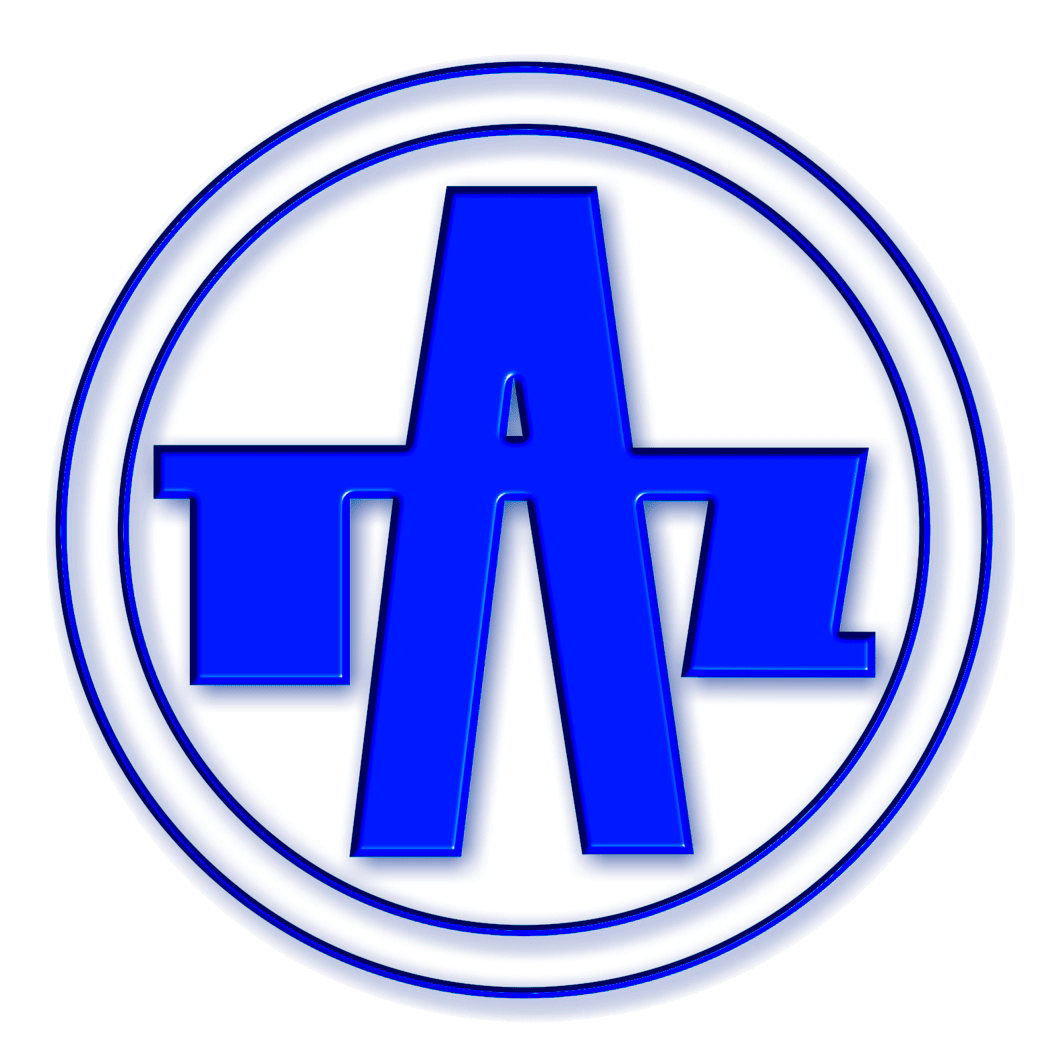 Logo von Trnavské automobilové závody